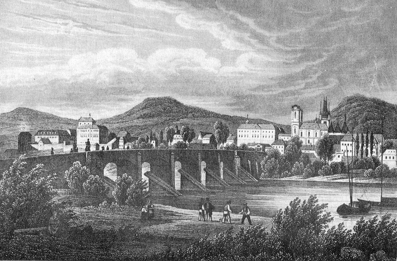 Historische Ansicht von Leitmeritz (heute Litomerice) an der Elbe in Tschechien. Stahlstich.